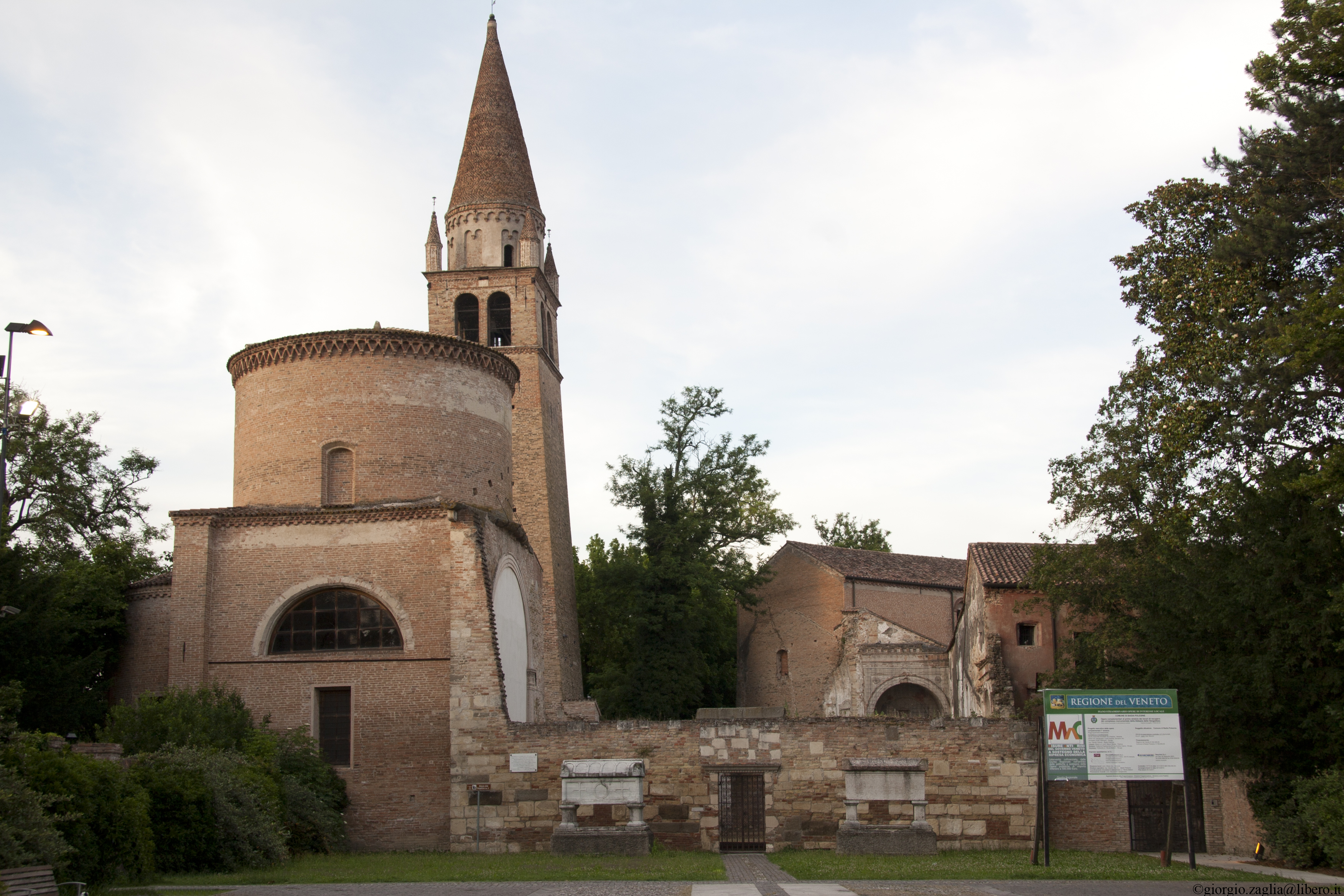 Abbazia della Vangadizza con arche sepolcrali di Alberto Azzo II e della moglie Cunizza di Altorff La foto è opera mia di cui cedo a Wikipedia la licenza d'uso, data pubblicazione 29/07/2013 Licensing Abbazia della Vangadizza, Badia Polesine (RO) con in primo piano arche sepolcrali di Alberto Azzo II e della di lui moglie Cunizza di Altorff